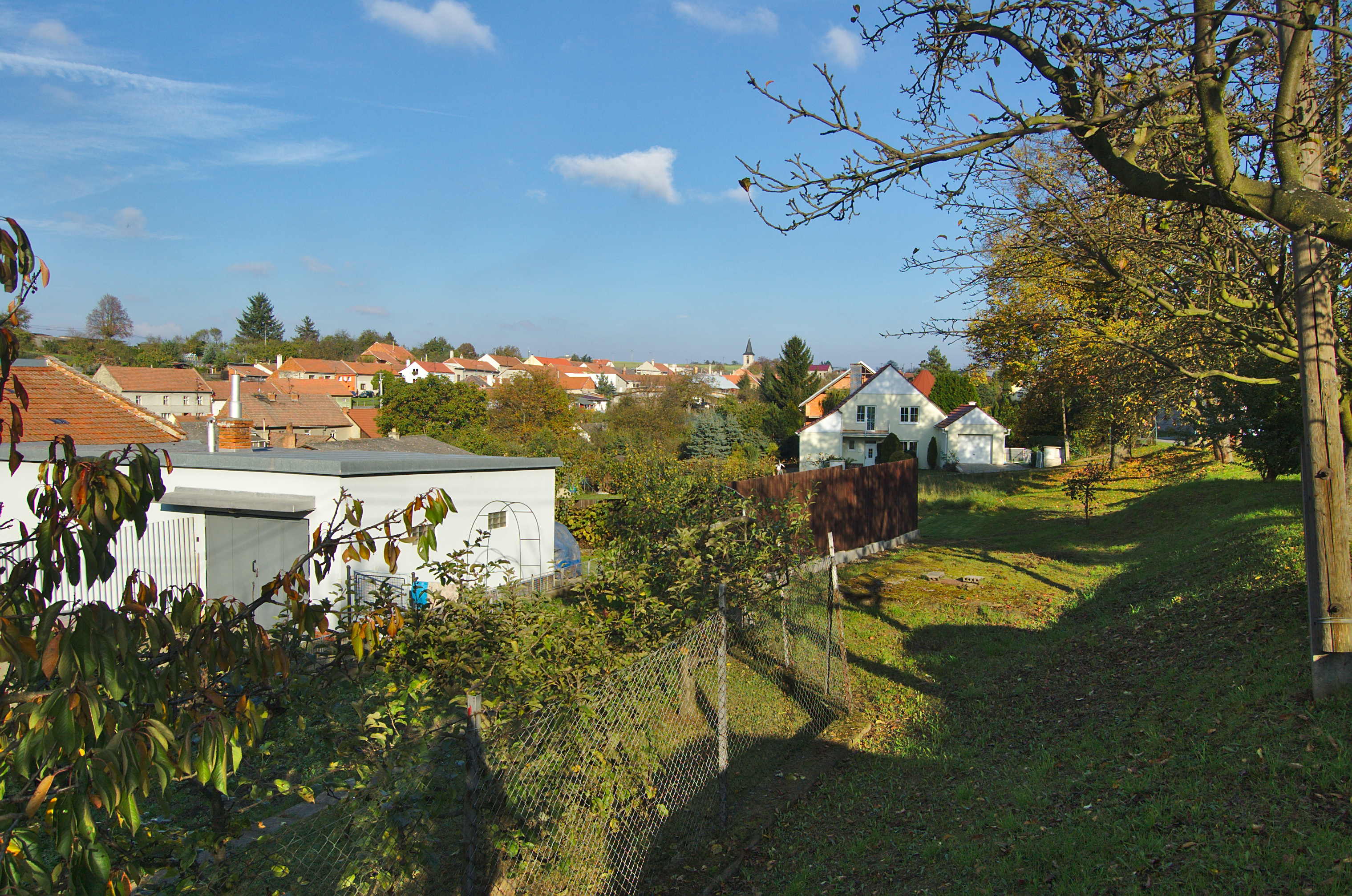 Pohled do obce, Myslejovice, okres Prostějov